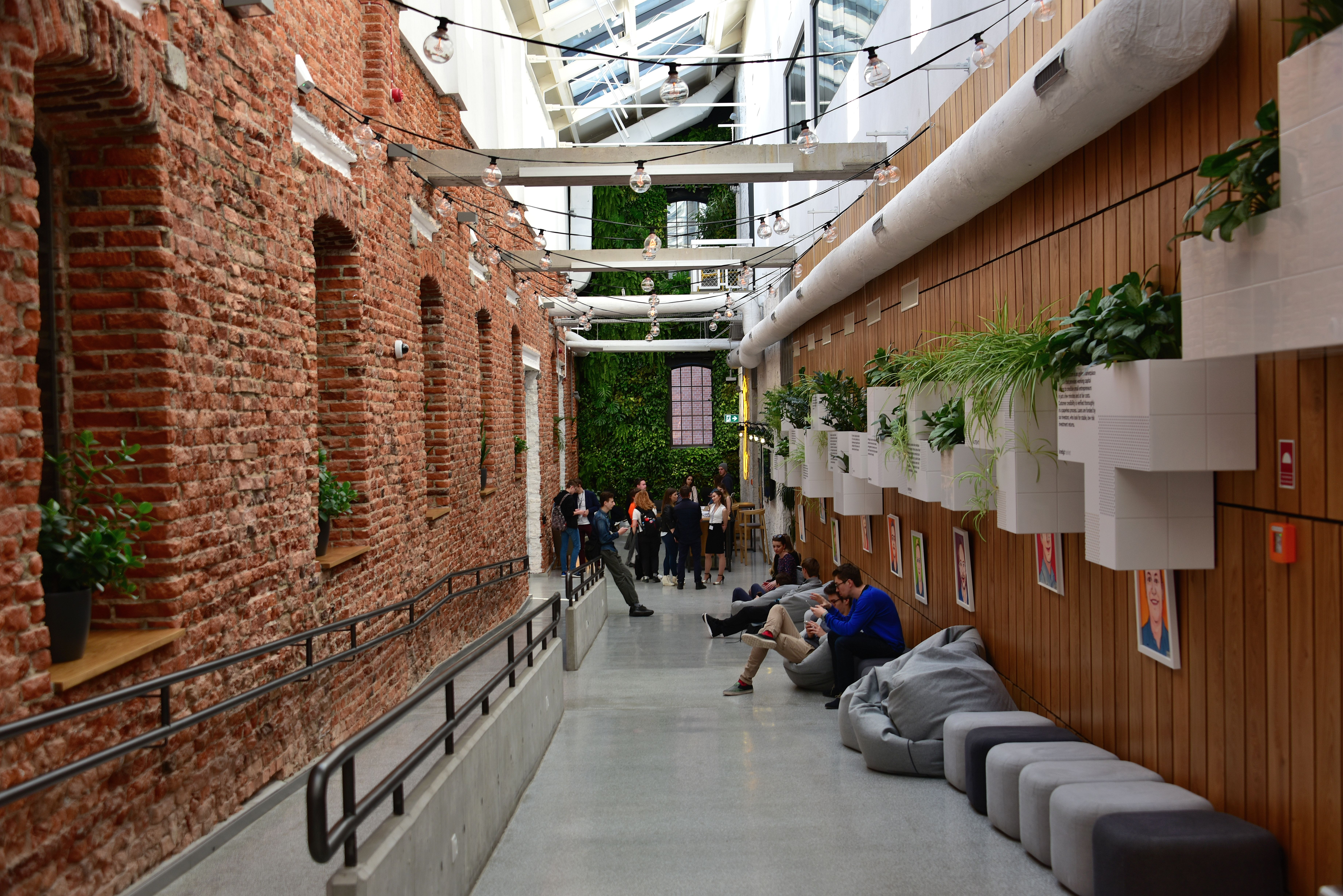 Campus Warsaw w Centrum Konser w Warszawie